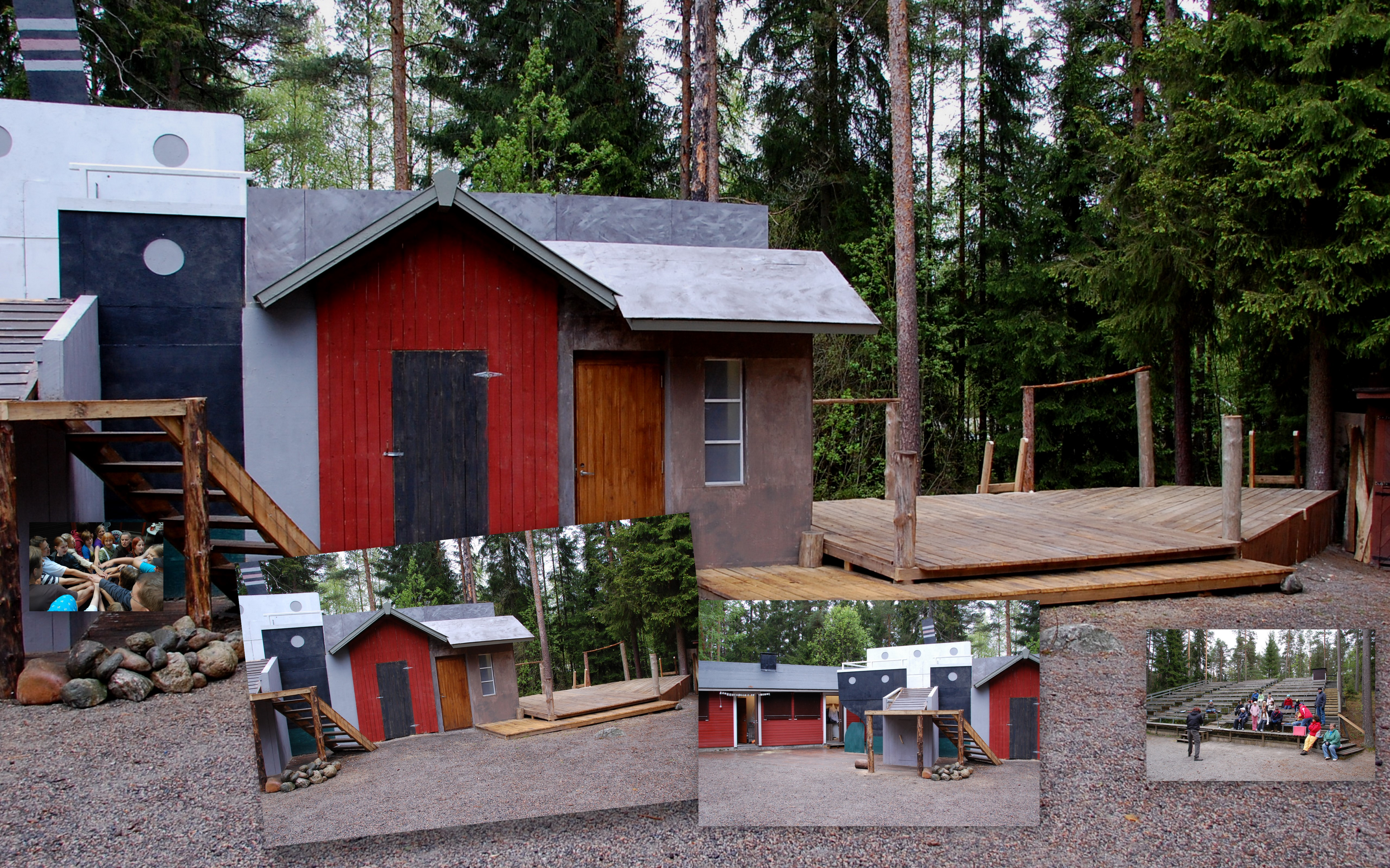 Näyttämö ja katsomokuvia Maskun teatterista